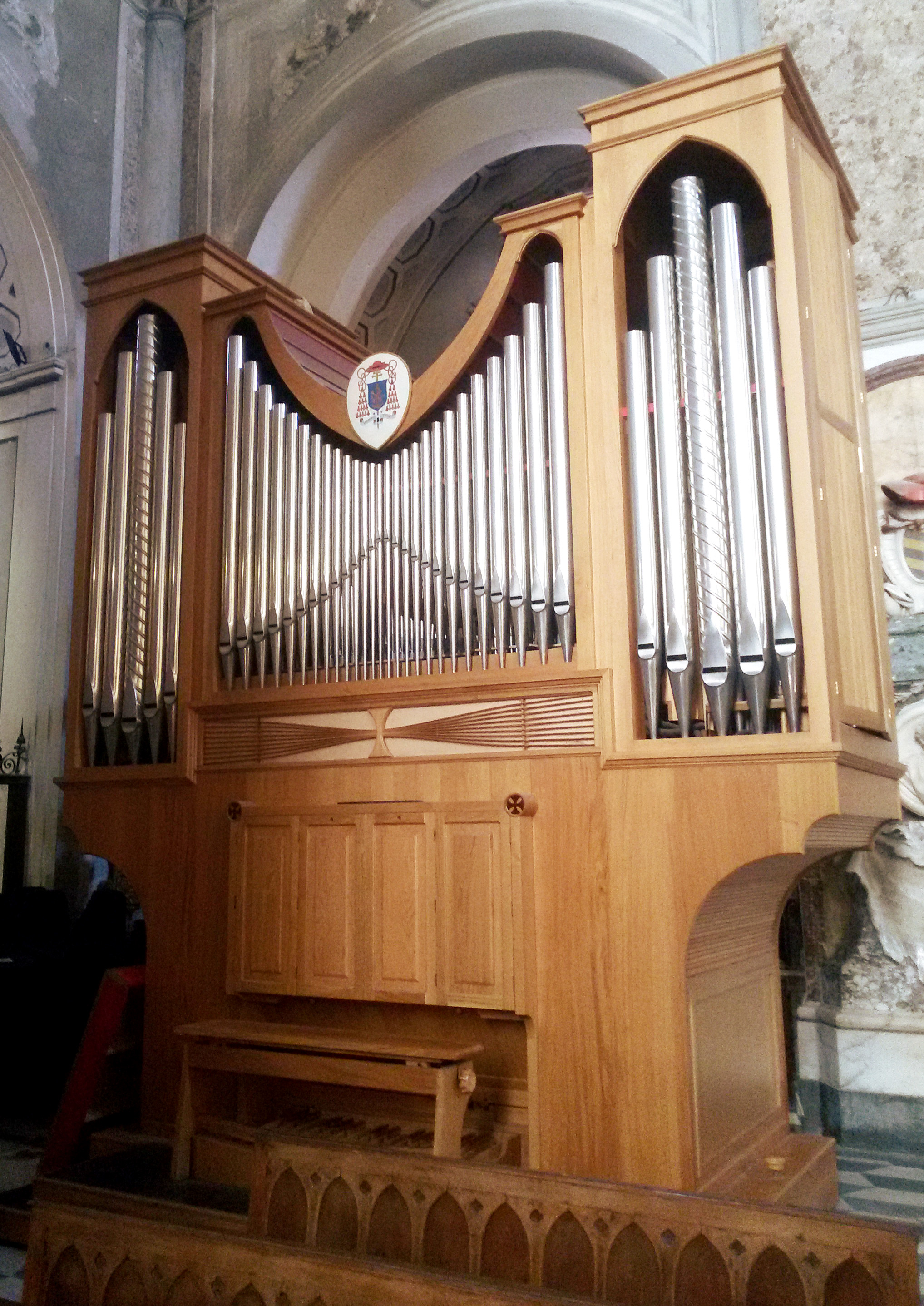 Corpo corale Bevilacqua dell'organo a canne (II+P/19), suonabile anche indipendentemente da quello maggiore.